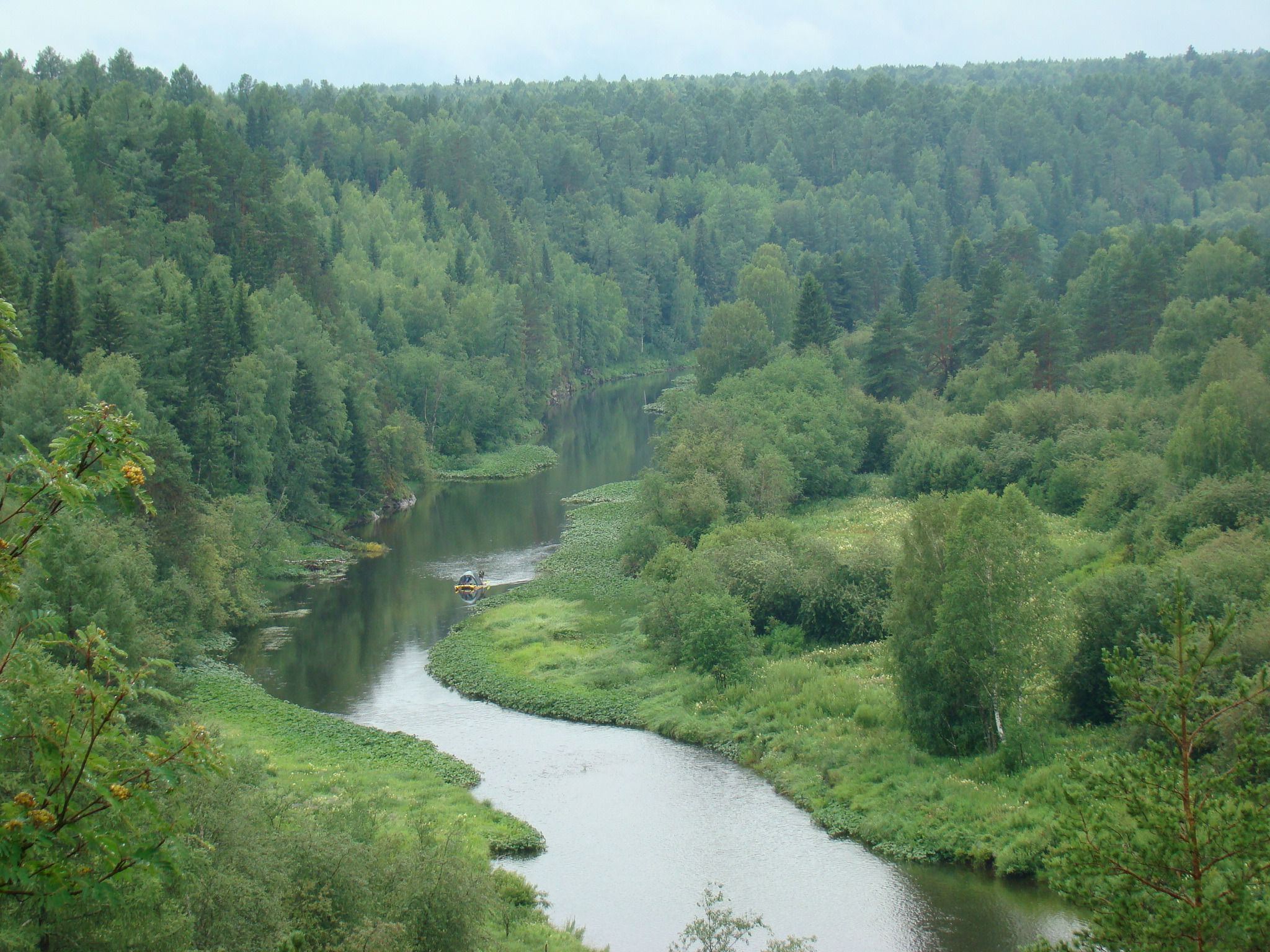 Национальный парк "Оленьи ручьи", река Серга